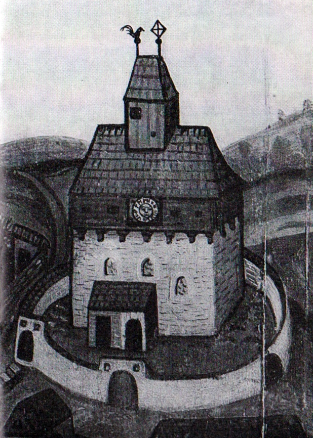 Rückerswalde, die Wehrgangskirche, Darstellung von 1583